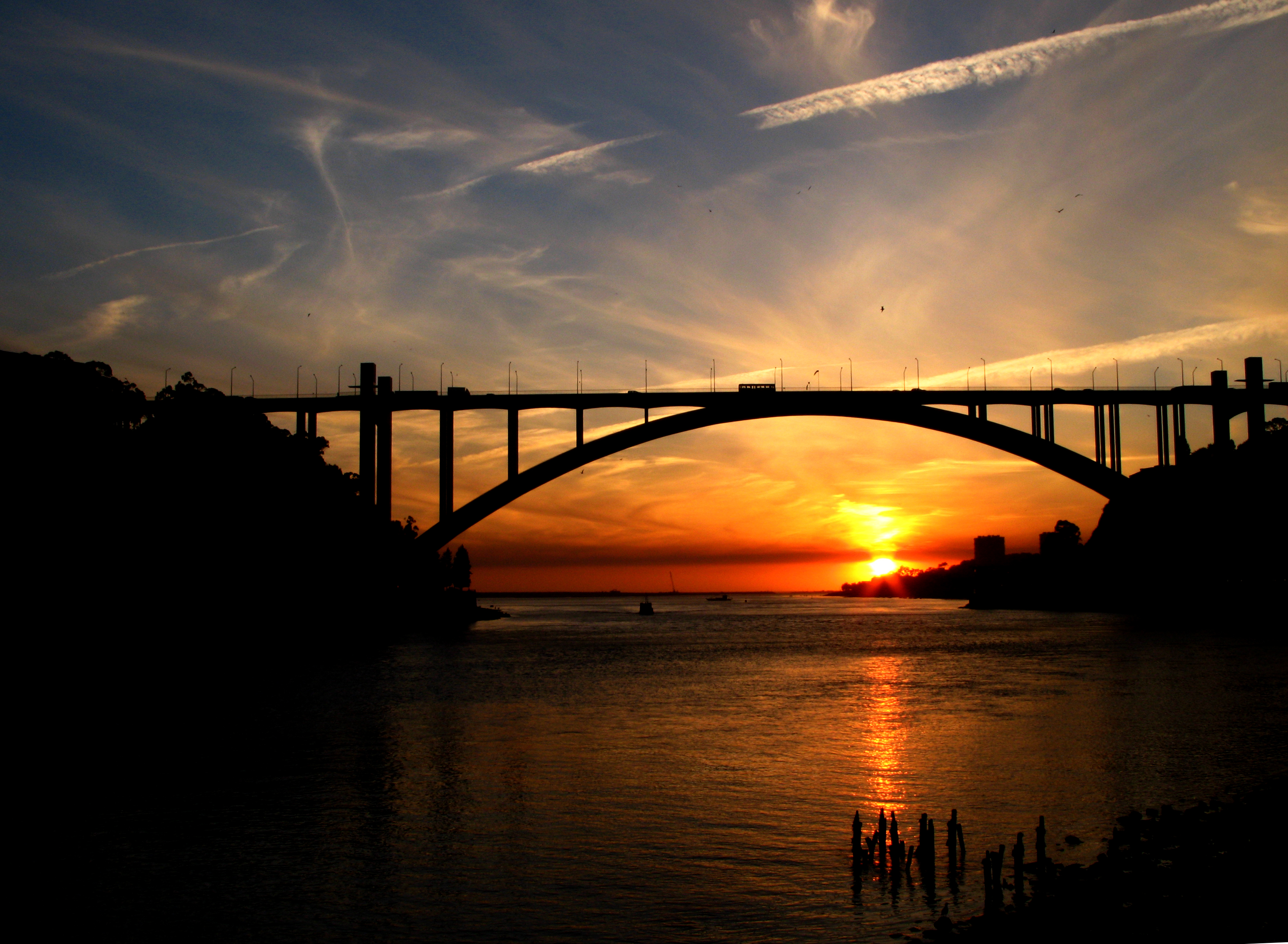 Por do sol no rio Douro